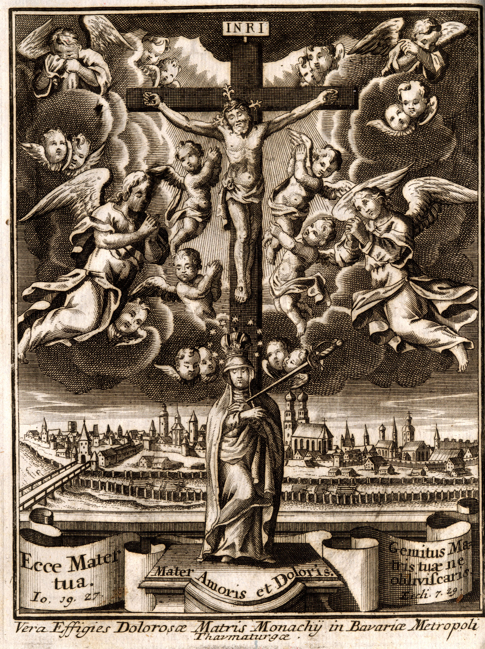 Frontispiz aus u.g. Werk. Abgebildet ist unter einem mit Engeln umsäumten und vom geöffneten Himmel rückwärtig bestrahlten Kruzifix die mit Krone und Sternen bekrönte Schmerzhafte Muttergottes, der ein Degen durchs Herz sticht. Den Hintergrund bildet eine Ansicht Münchens - die Frauenkirche (Mariendom) schmiegt sich dabei prominent an die Kontur Mariens an. Die Texte lauten: 'Mater Amoris et Doloris.' (Mutter der Liebe und des Schmerzes), 'Ecce Mater tua. Io. 19. 27.' (Siehe, Deine Mutter. Joh. 19.27), 'Gemitus Matris tuæ ne obliviscaris. Eccl. 7.29.' ([Ehre Deinen Vater und] vergiß nicht das Ächzen Deiner Mutter. Ecclesiasticus 7.29), 'Vera Effigies Dolorosæ Matris Monachÿ in Bavariæ Metropoli Thaumaturgæ.' (Wahres Abbild der Schmerzhaften Muttergottes, zu München, in Bayerns Hauptstadt wundertätig).